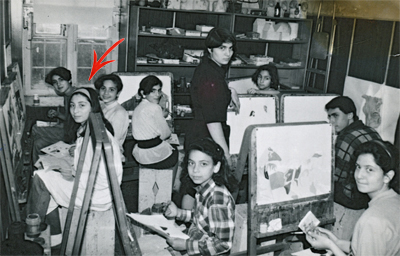 Jerewan, Ara Hovsepyan's Studio, 1993 - 94